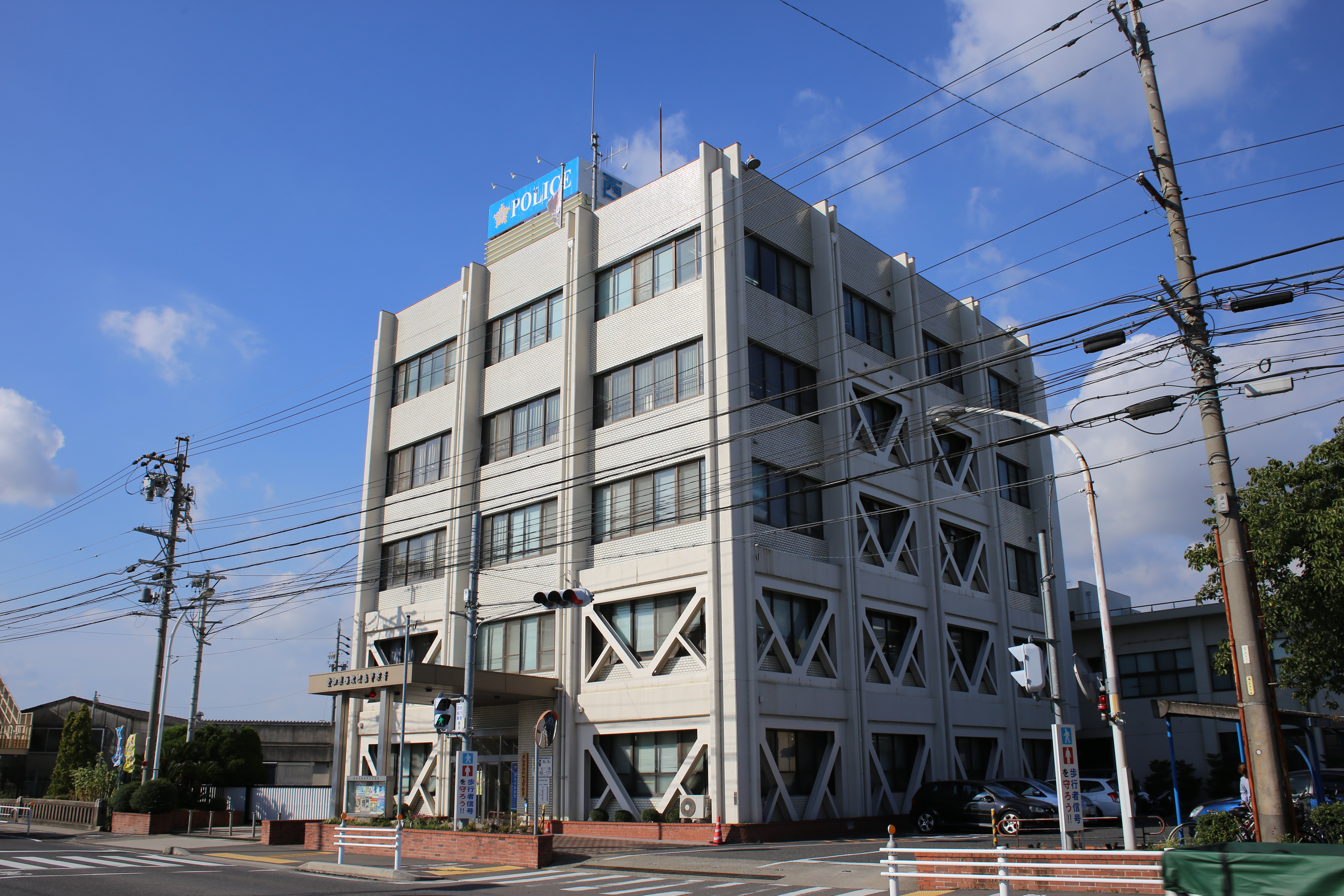 愛知県清須市西枇杷島町弁天の愛知県警察西枇杷島警察署を西側公道南側より撮影